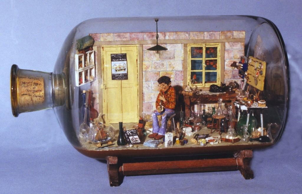 Autoportrait de G. A. dans son atelier de Forges-les-Bains en 1984. Reproduction, d'une partie de sa collection de bouteilles vides, en verre soufflé par Yves Borrel.